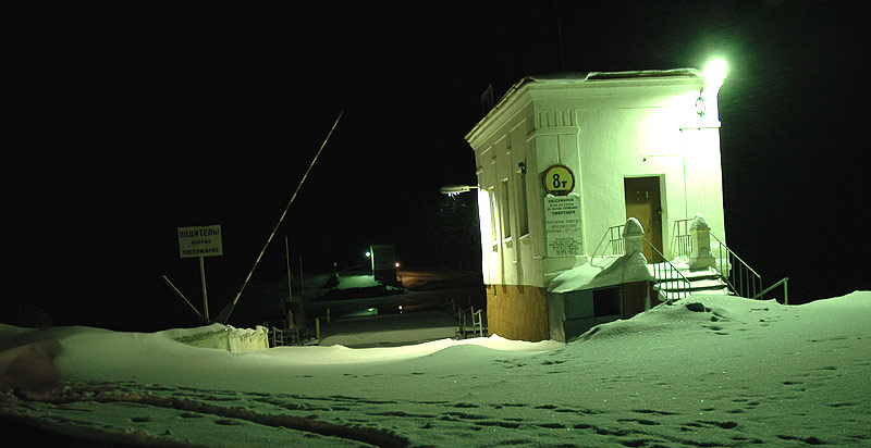 Паромная перепарава зимой Канал имени Москвы. Паромная переправа № 3. Зима